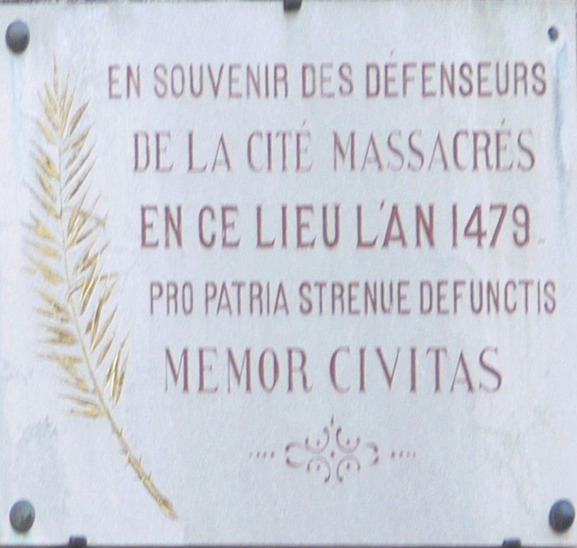 Plaque située impasse de la Défense (rue Salengro) commémorant le massacre des défenseurs vésuliens de 1479